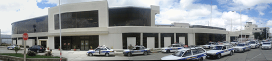 Nueva fachada Aeropuerto Internacional El Alto